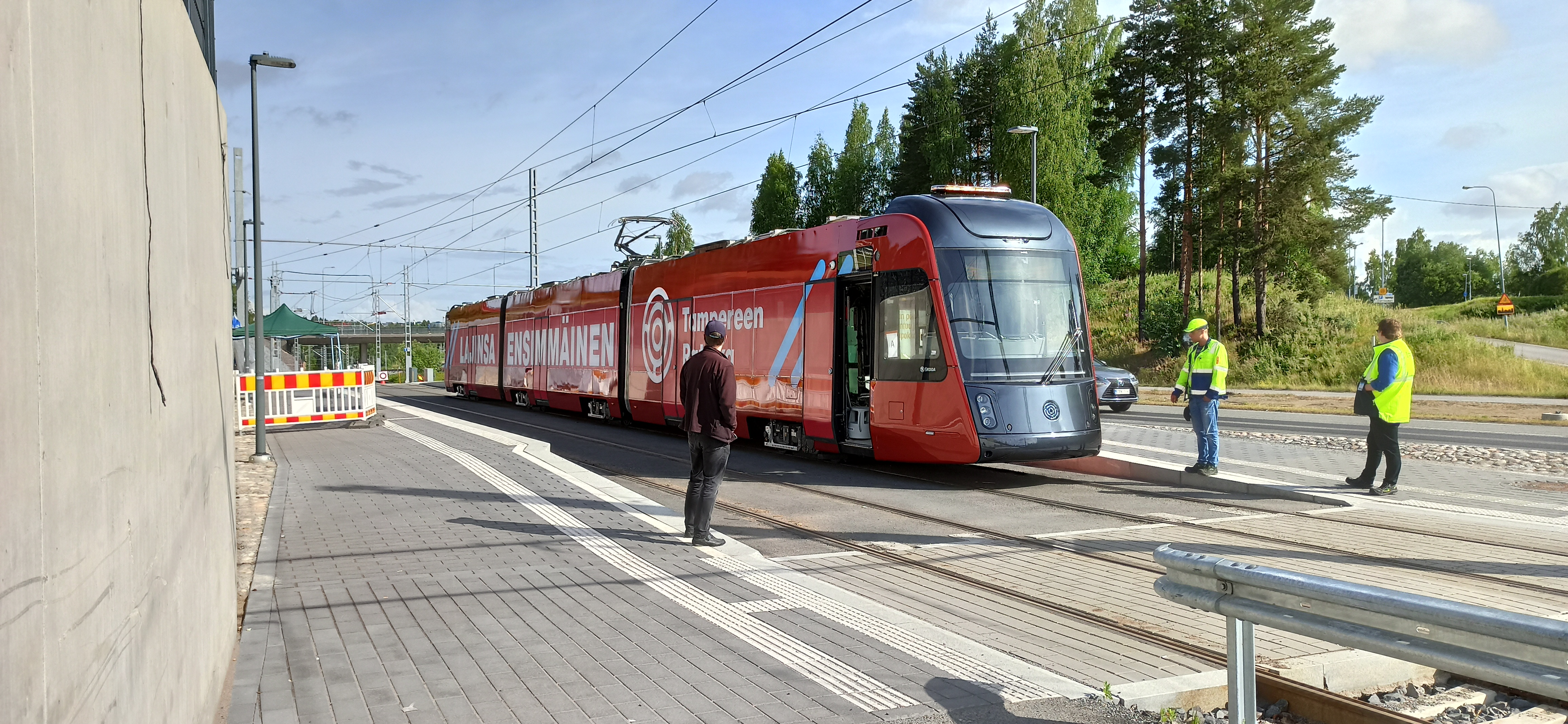 Artic X34 Tampereella